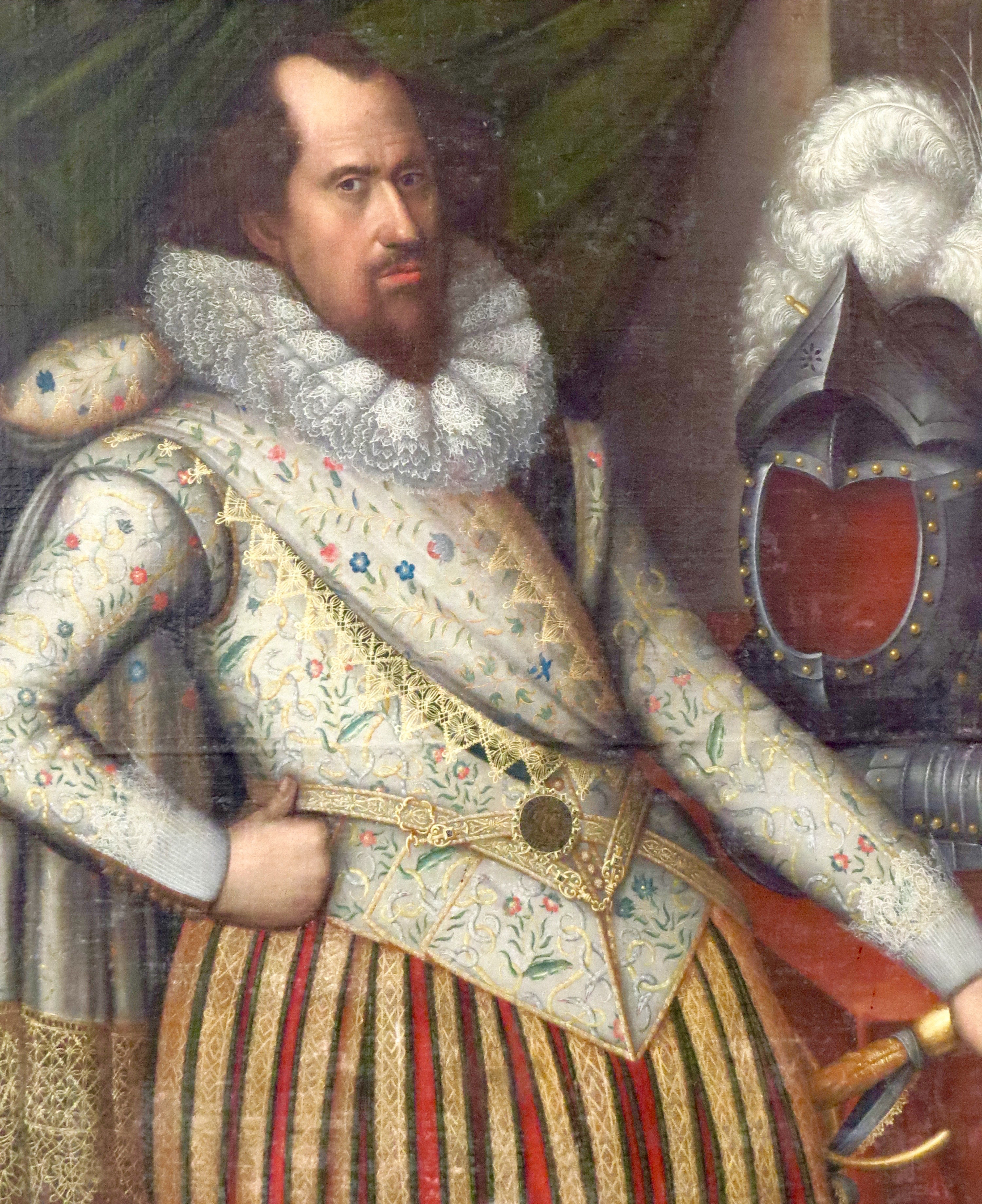 Hertug Ulrik af Danmark og Norge (1578–1624), ukendt kunstner. Husum Slot